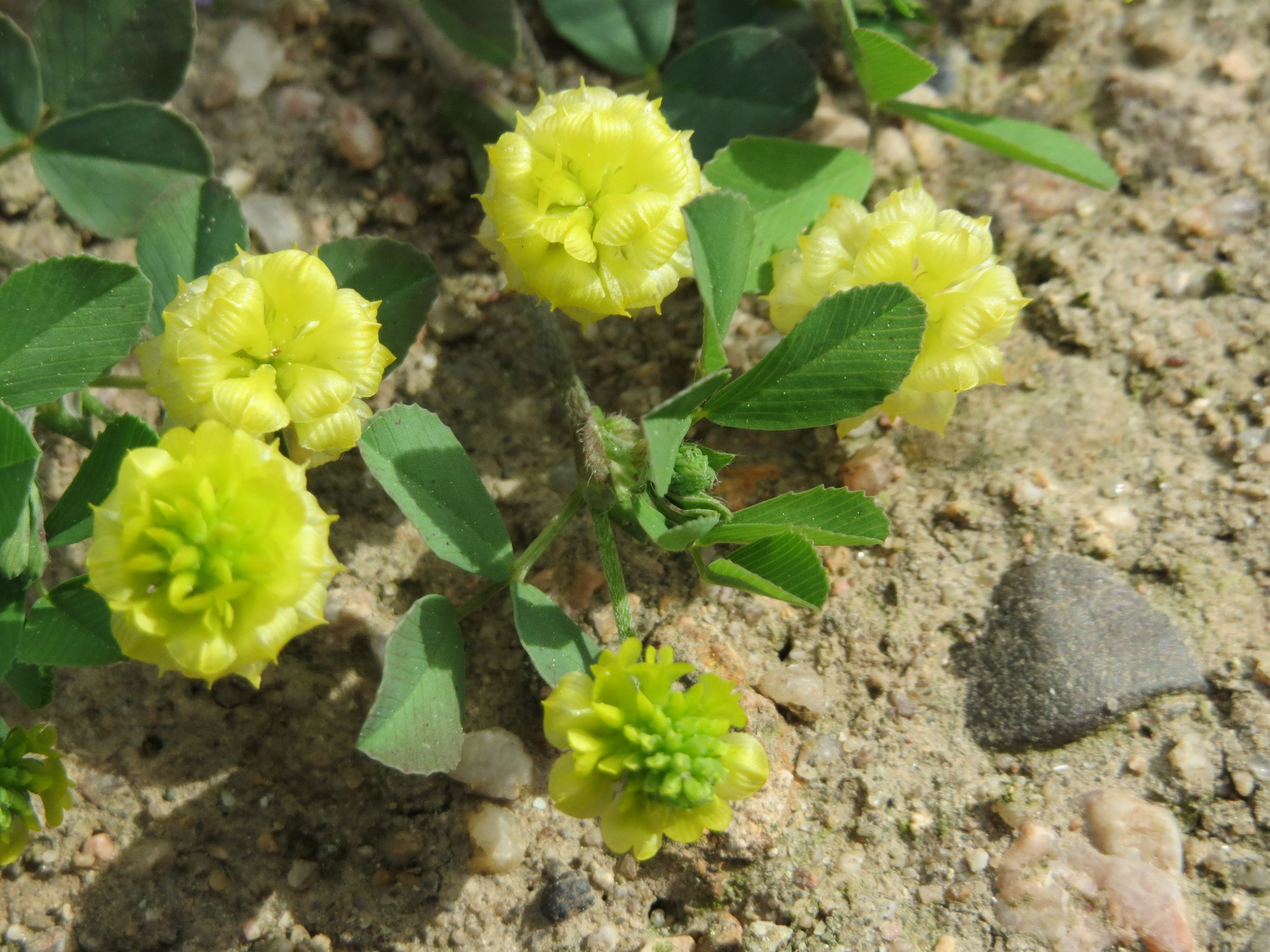 Feld-Klee (Trifolium campestre) in Hockenheim